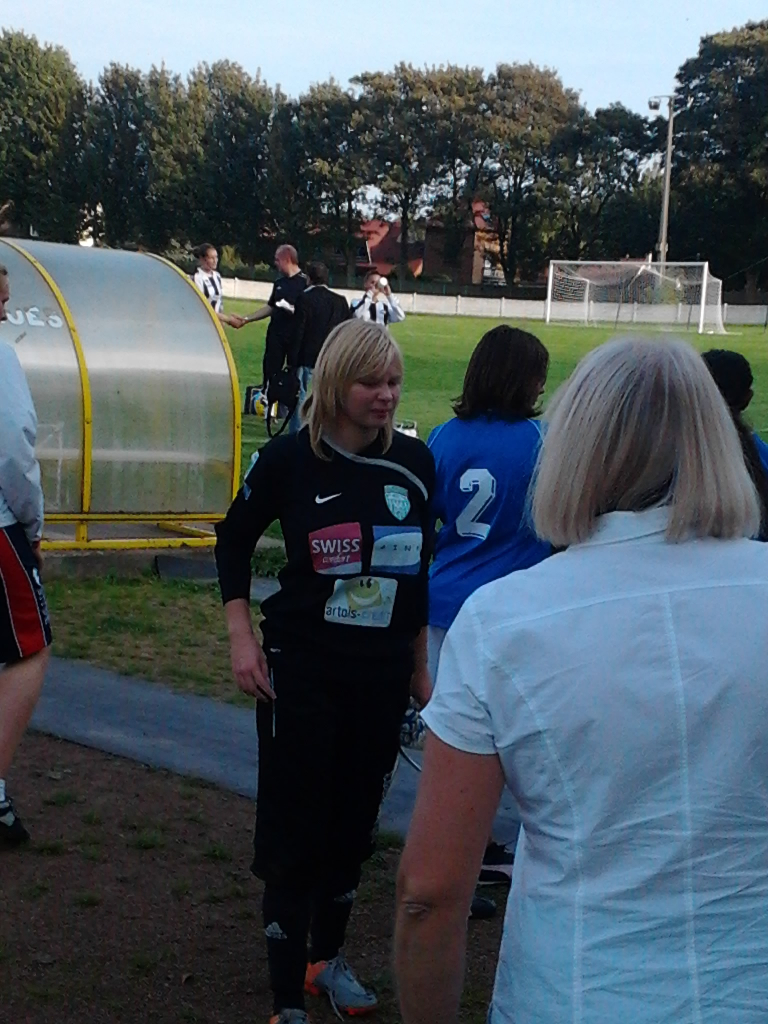 Photo de la gardienne du FCF Hénin Célia Degorgue après le match Hénin/Juvisy (0-9) quatrième journée du championnat de france féminin 2011-2012 (25 septembre 2011)